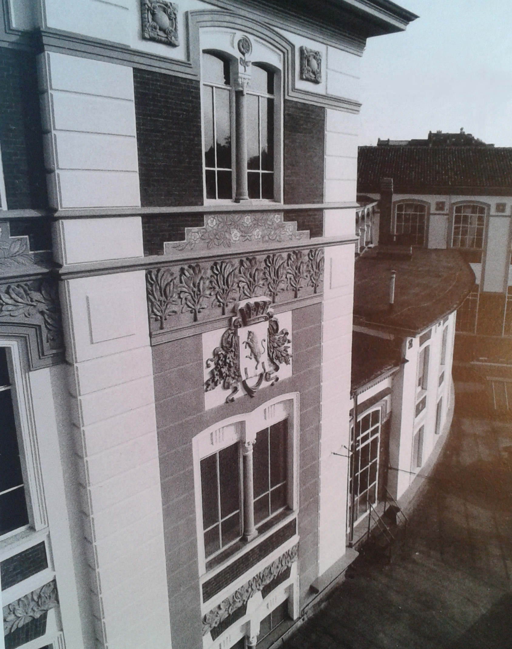 La facciata dell'Istituto che dà su Via Rossini, mostra fregi floreali disegnati dall'ingegner Camillo Dolza e le bifore liberty.